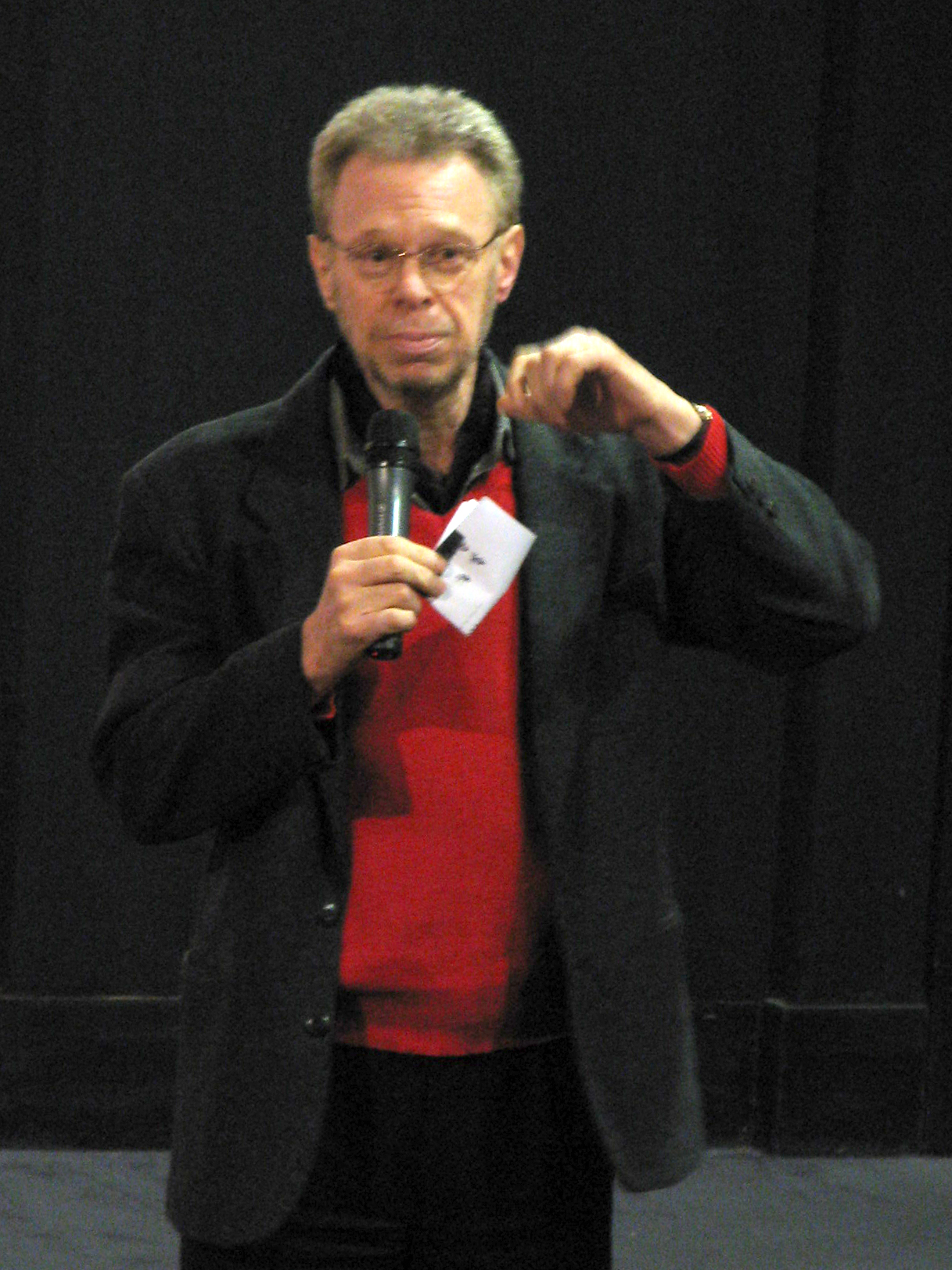 Michael Raeburn, à Amiens (Somme, France) - De passage au "Ciné St-Leu" pour présenter son film Triomf lors du « 28ème Festival international du film d'Amiens ». .